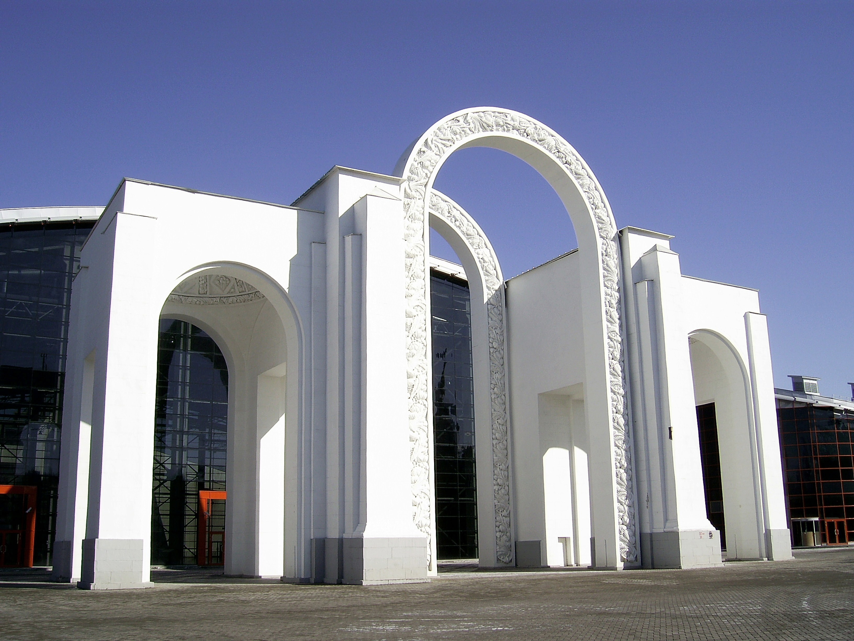 никогда не перестраивались с 1939 года